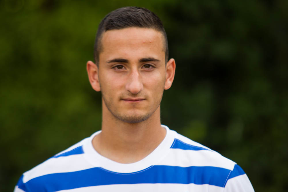 German football player Erdoğan Yeşilyurt, MSV Duisburg